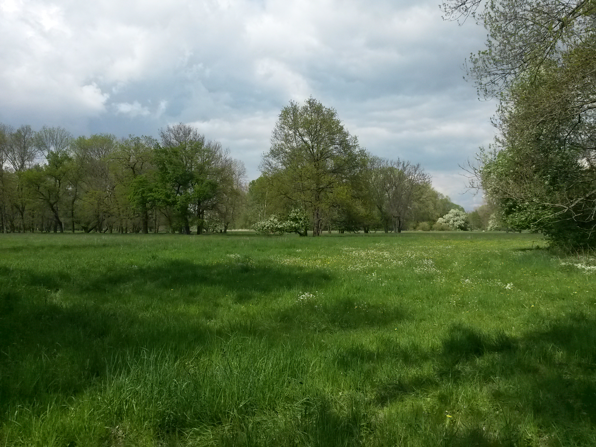 Elsteraue bei Profen im Frühling